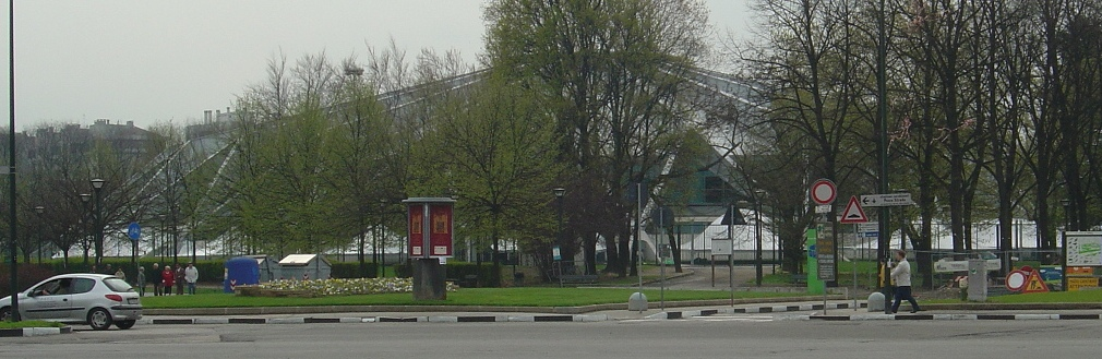 PalaRuffini